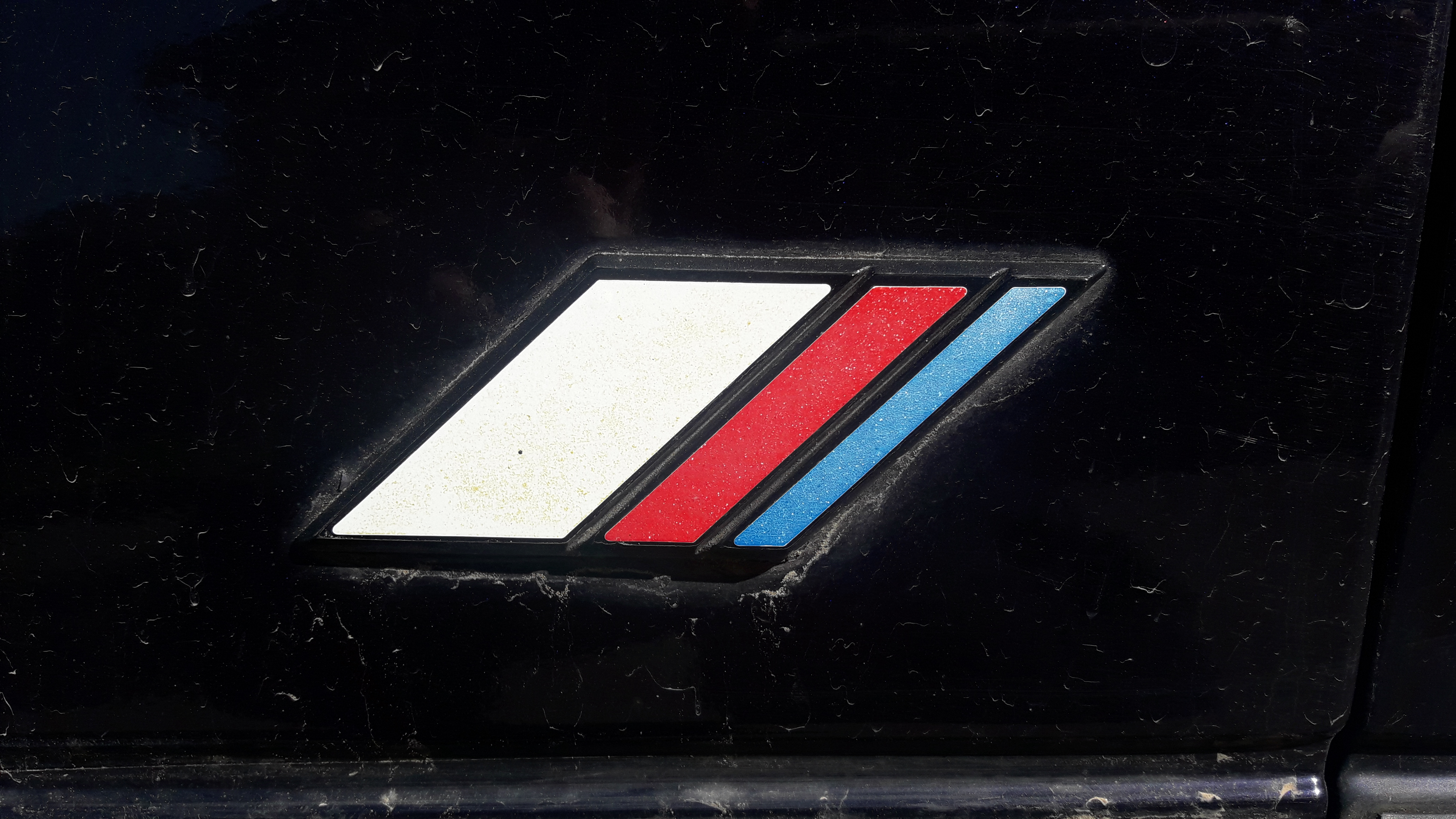 samsung 20180420 153009